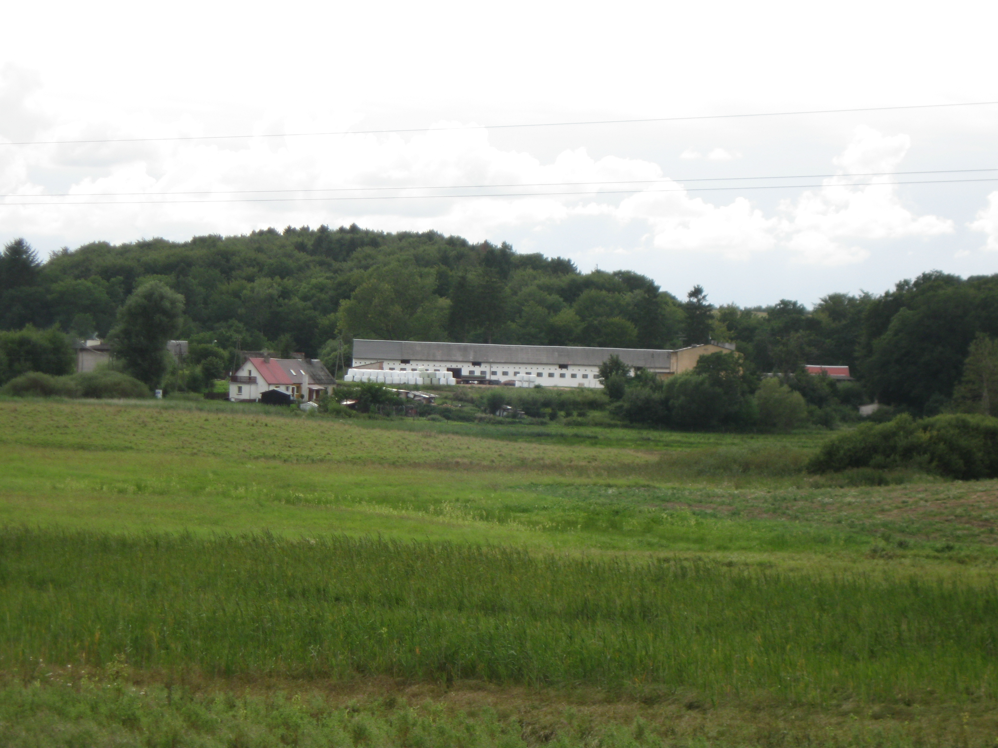 Panorama Petrykóz - widok z drogi Starnin - Byszewo